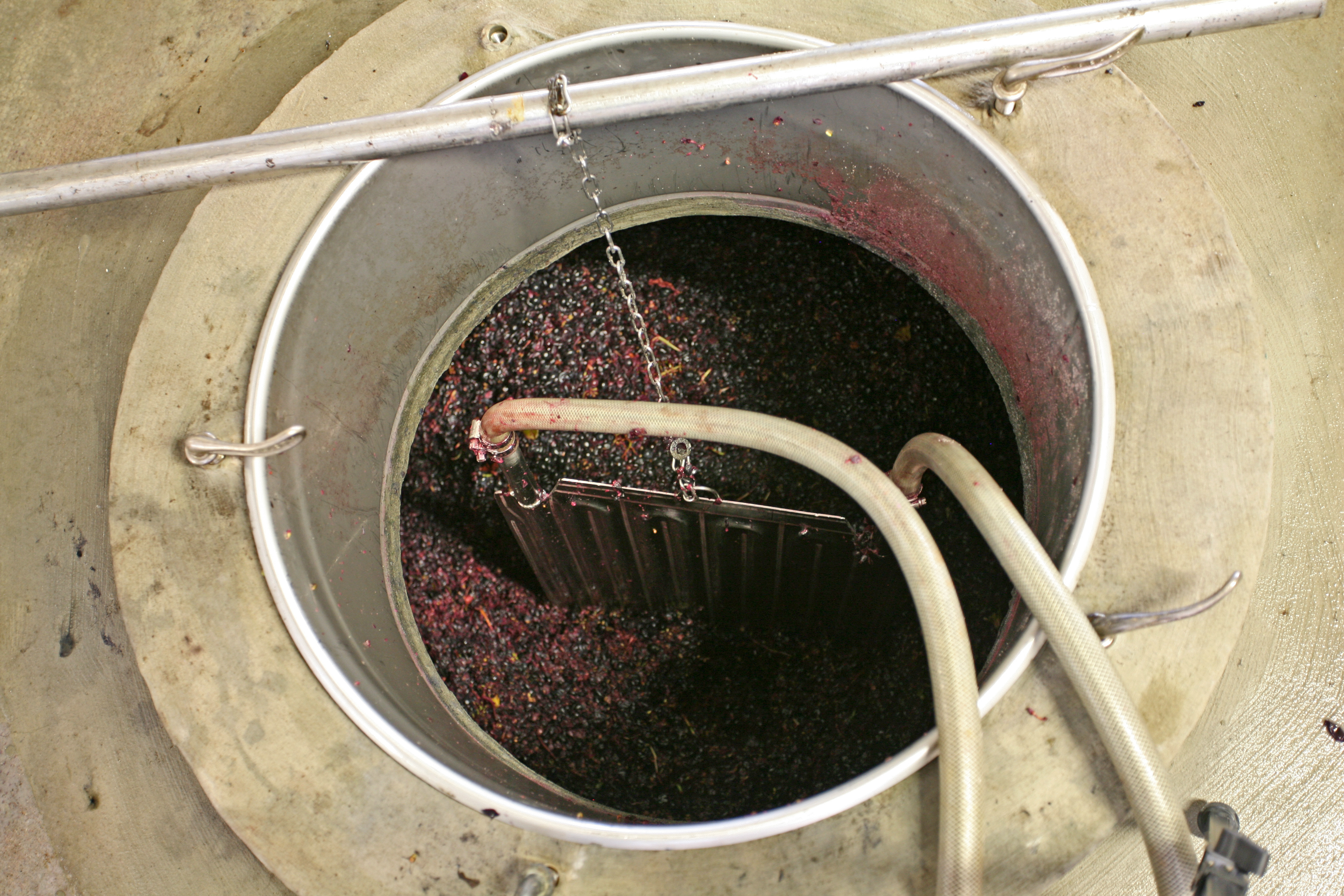 Rotweinmaische mit Durchlaufwärmetauscher